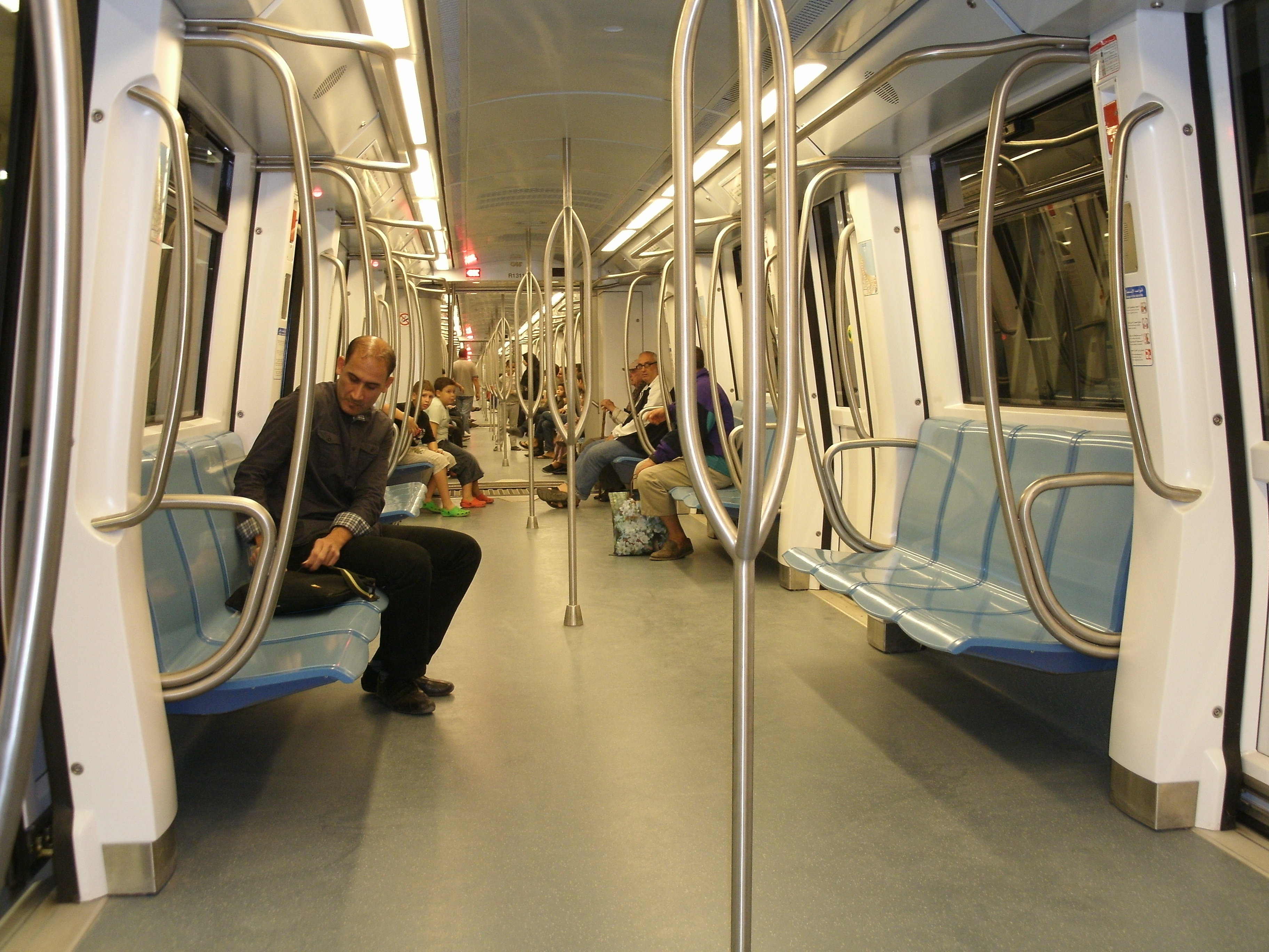 Les rames du métro d'Alger